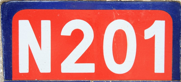 cartouche de la route nationale 201